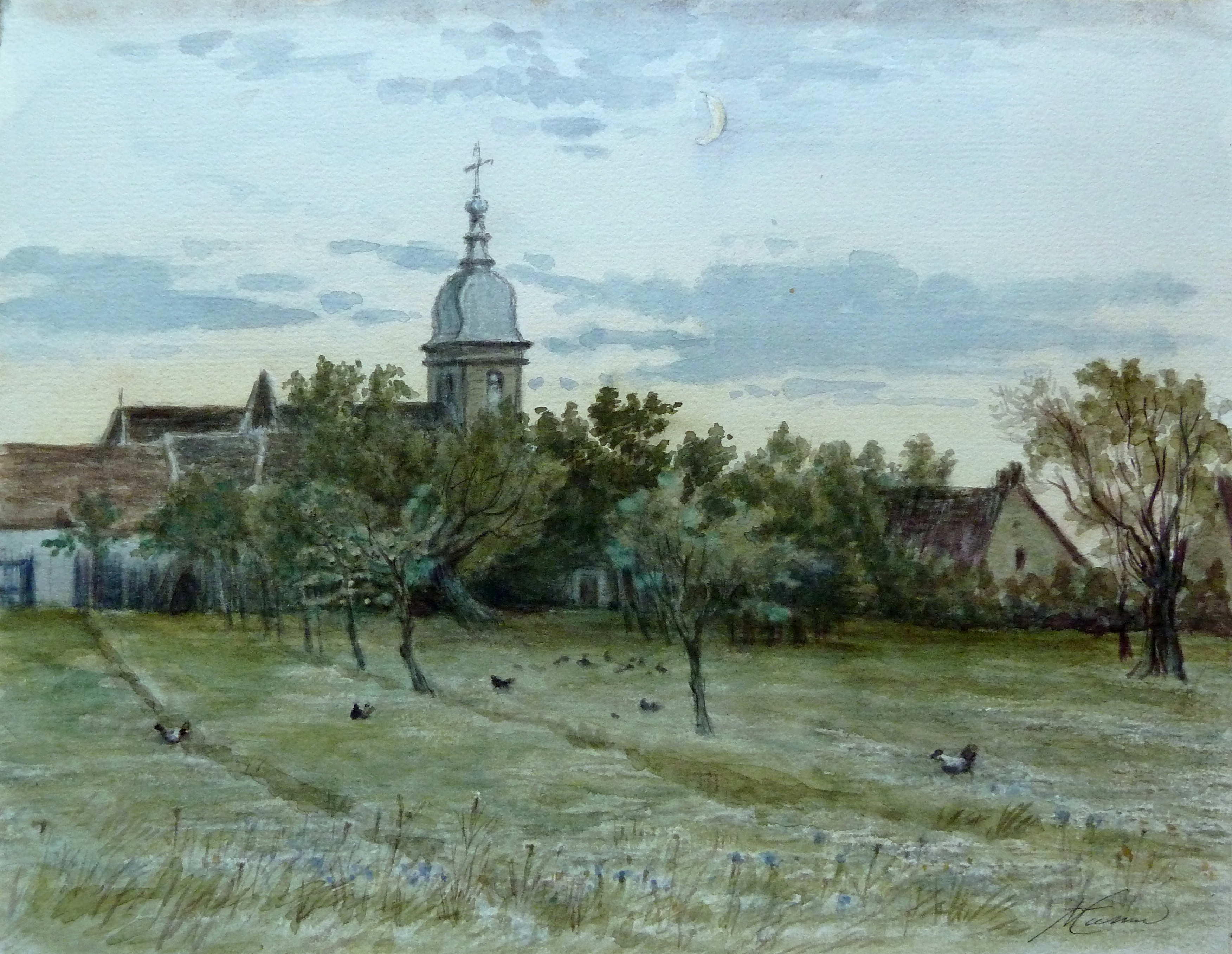 Aquarelle de Victor Masson de la fin du XIXe siècle représentant une vue de Gourgeon où apparaît le clocher de son église.